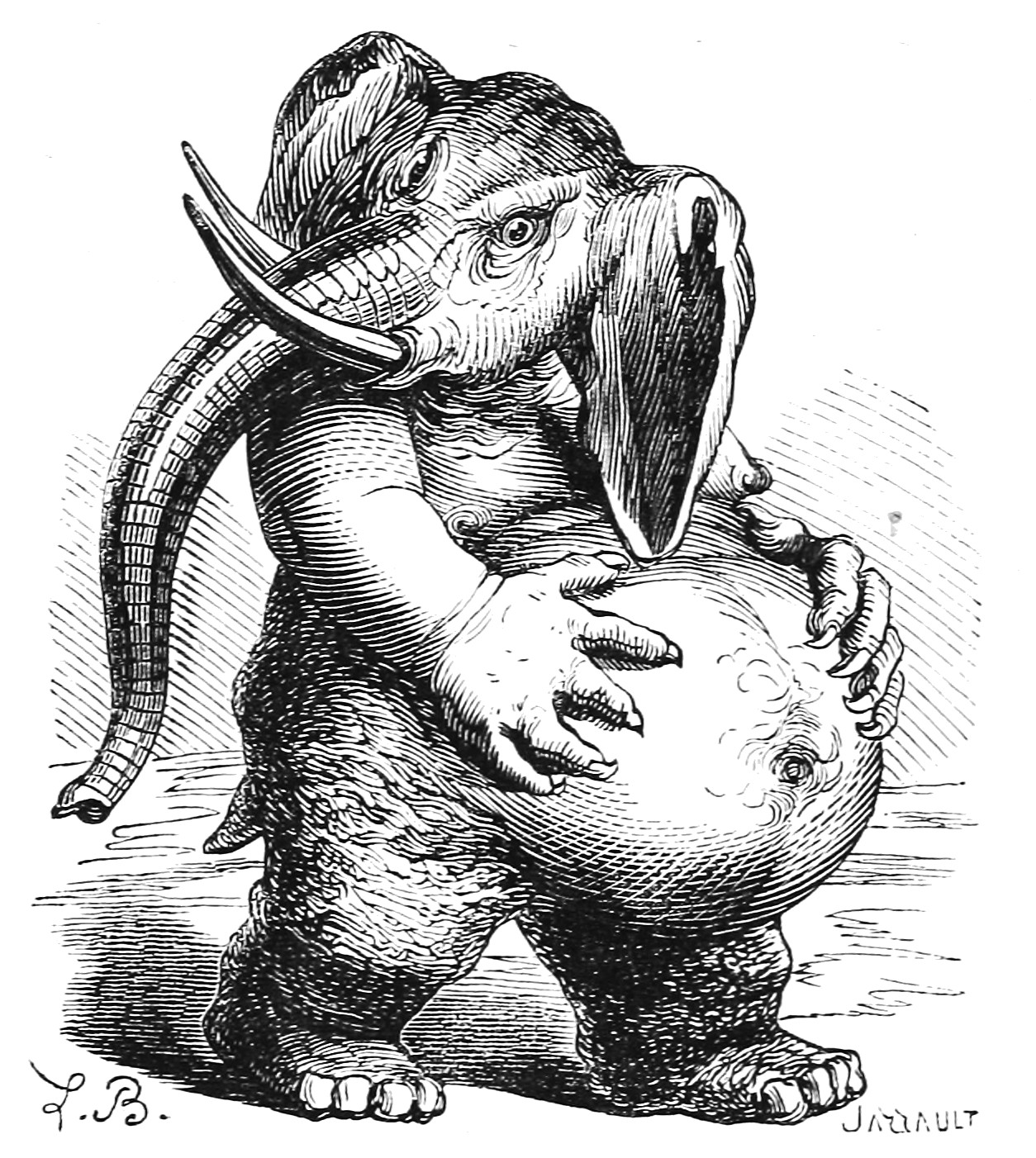 Béhémoth. Illustration du Dictionnaire infernal de Jacques Auguste Simon Collin de Plancy par Louis Le Breton, 6eme édition, 1863.